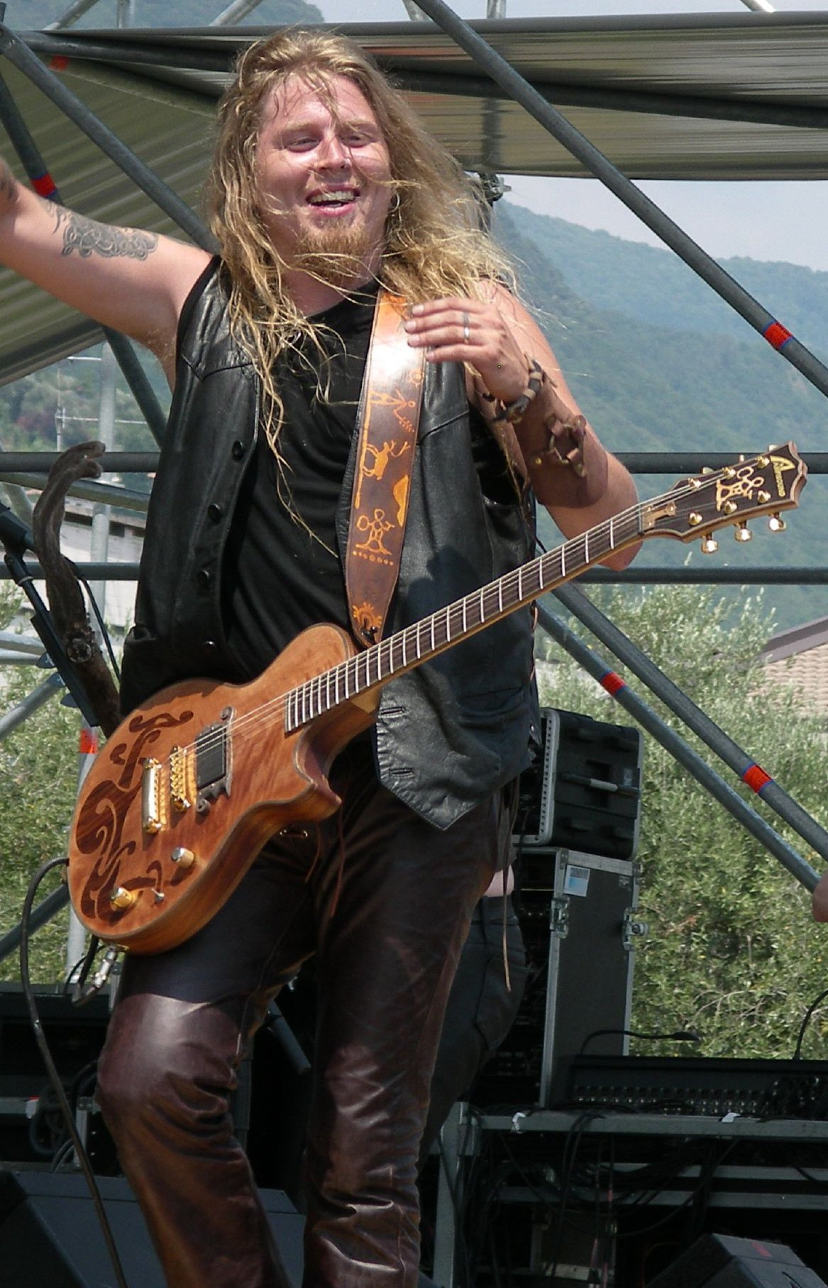 Jonne Järvelä from Korpiklaani live at the Evolution Festival in Italy 2006.